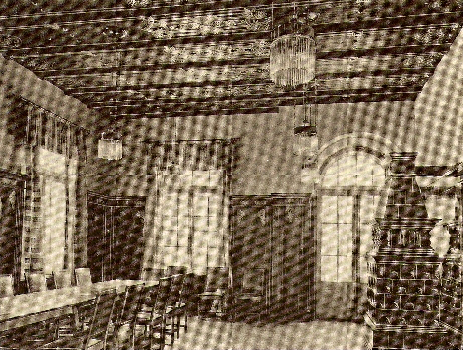 Der Sitzungssaal des alten Rathauses in Kolbermoor. Die wertvollen Holz- und Intarsienarbeiten an den Decken und Wänden sowie die Butzenscheiben in den Fenstern sind die Besonderheiten dieses Sitzungssaales.